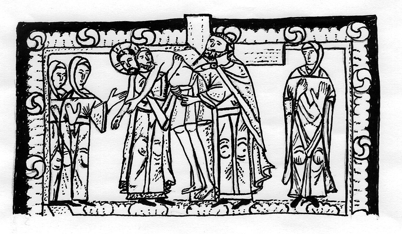 Nachzeichnung einer Buchillustration im Codex Aureus in Gnesen